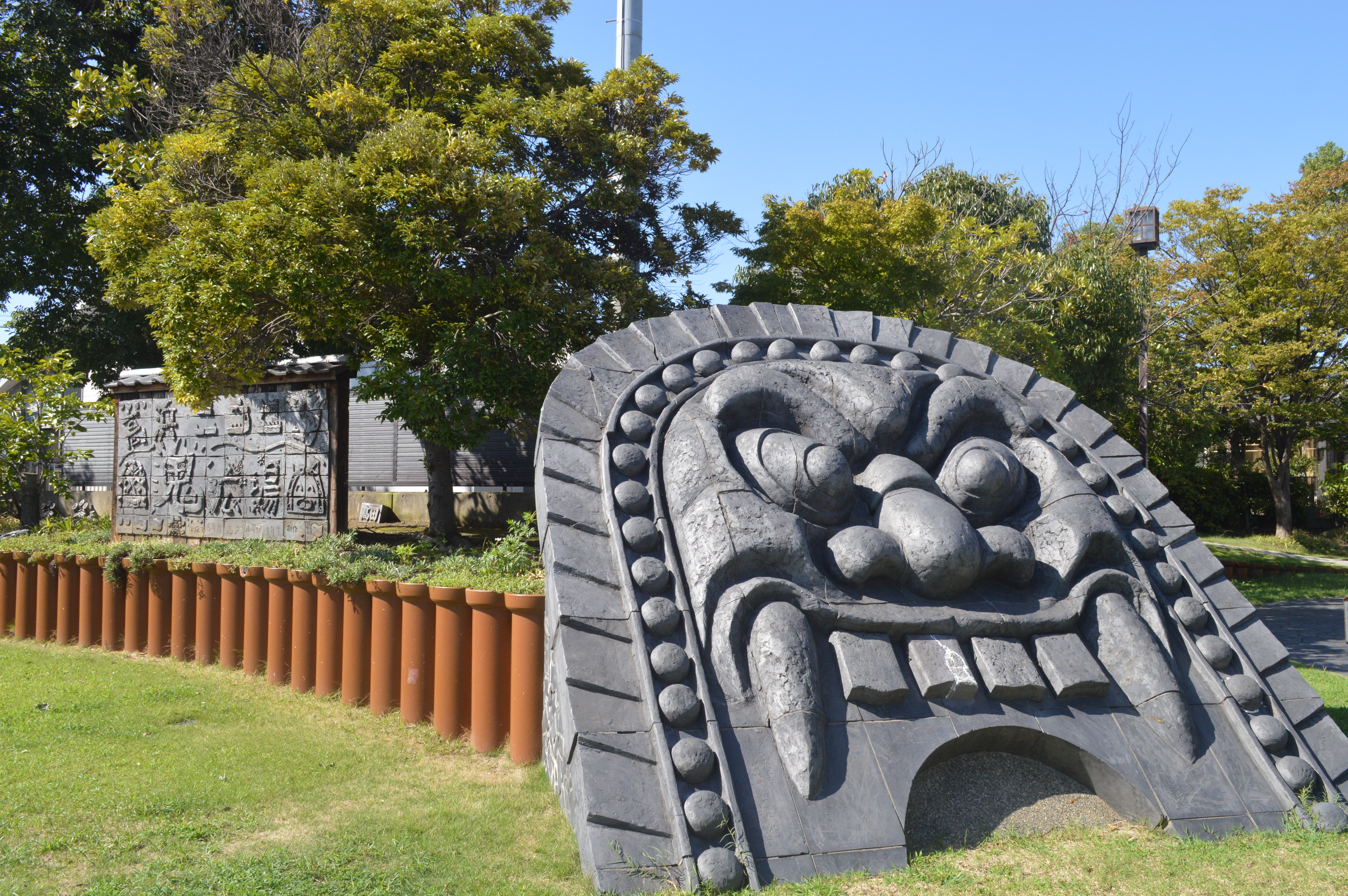 愛知県高浜市のニコニコ鬼広場。三州瓦が用いられている。